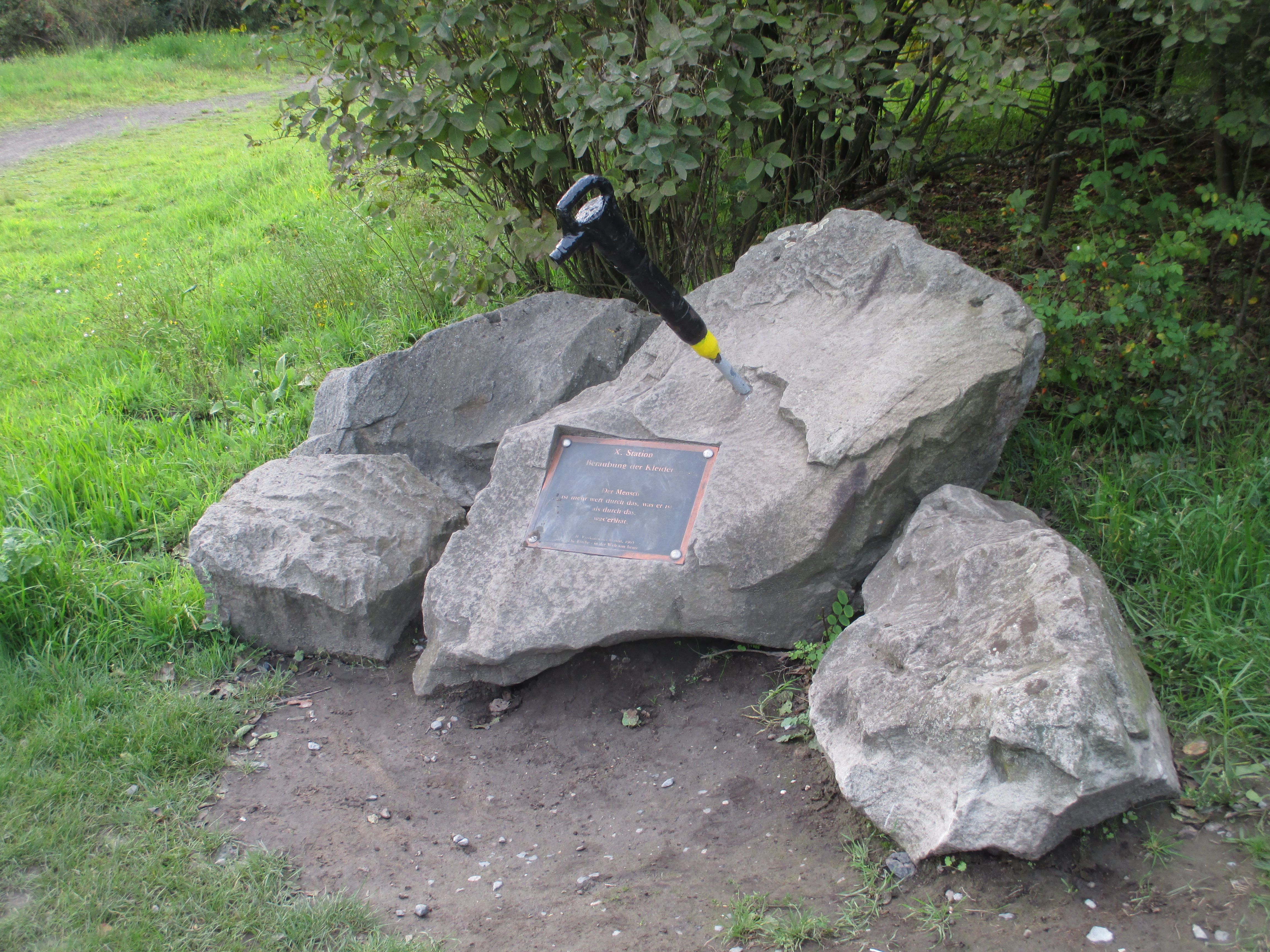 Station 10 des Bergbaukreuzweges an der Halde Haniel in Bottrop.